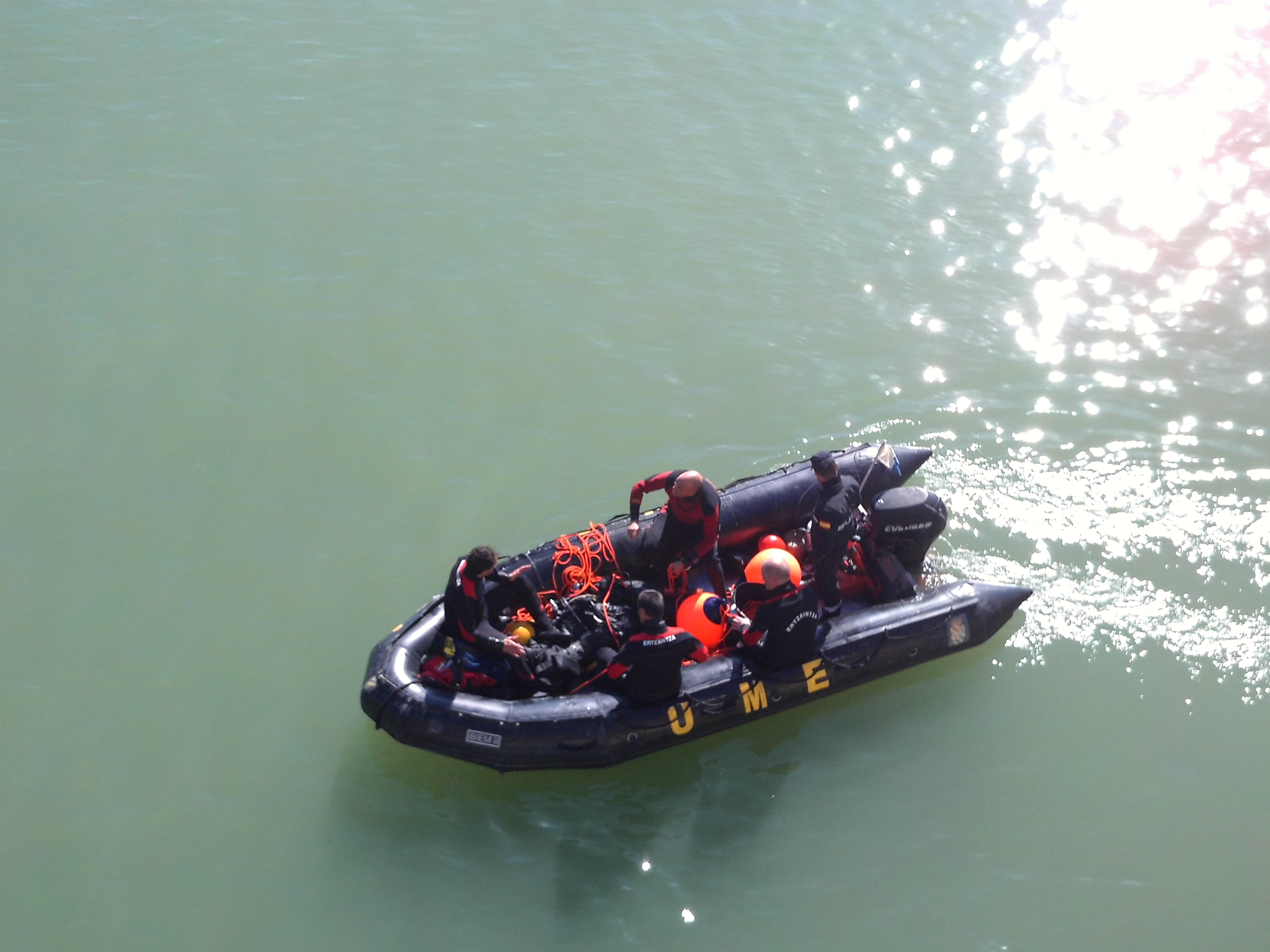 Lancha de la UME en el Guadalquivir. Sevilla, Andalucía, España.